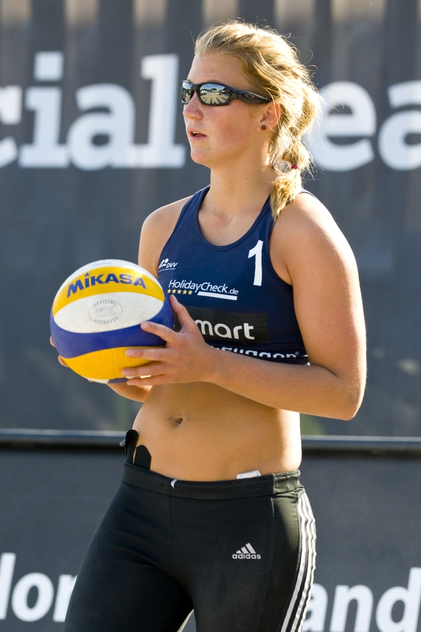 Isabel Schneider ist deine deutsche Beachvolleyballerin